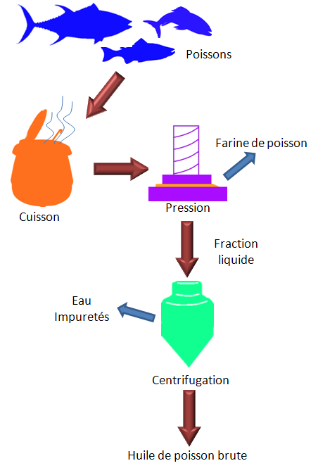 Schéma de la fabrication de l'huile de poisson brute